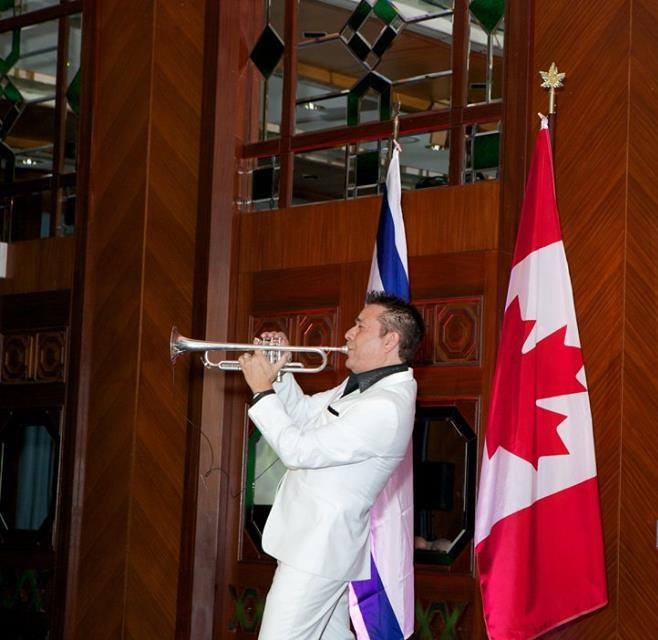 אריק דוידוב בקנדה